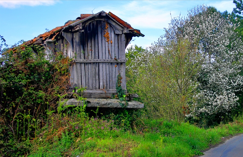 Hórreo na provincia da Coruña